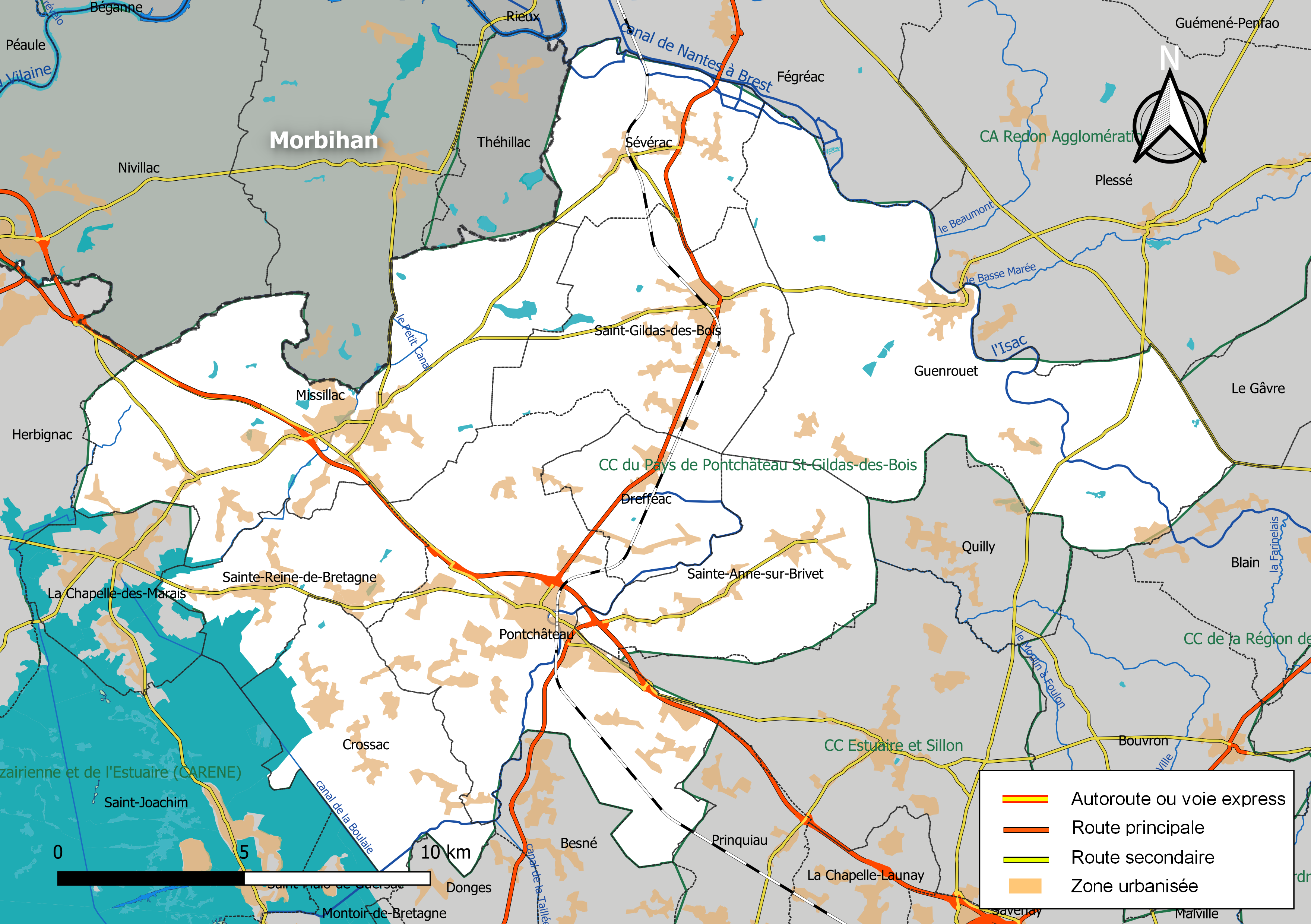 Carte géographique de la communauté de communes du pays de Pont-Château - Saint-Gildas-des-Bois, département de la Loire-Atlantique, France. Composition au 1er janvier 2019.